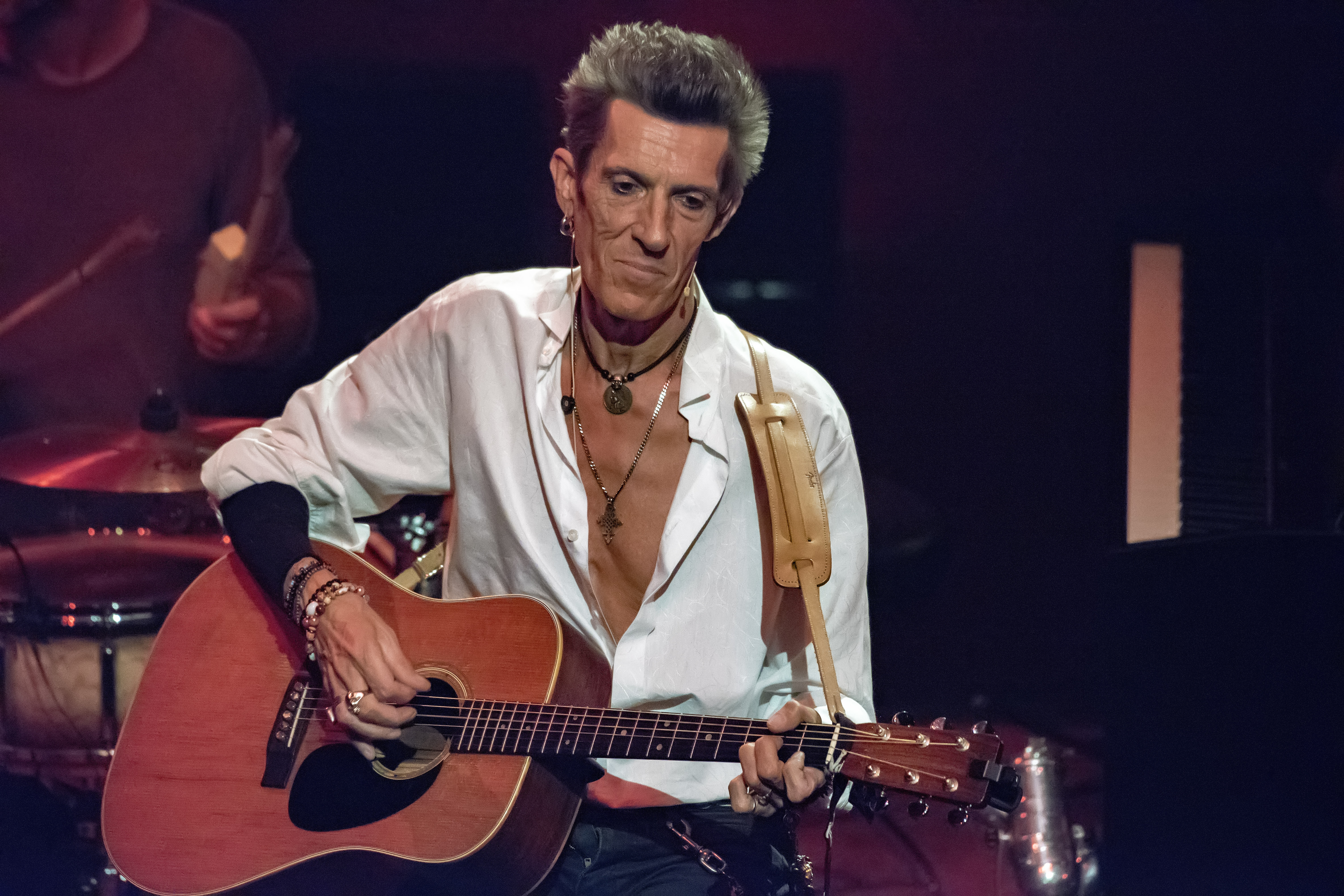 Willy Willy met de Scabs